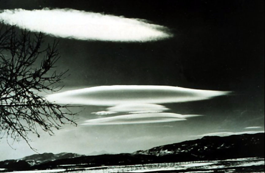 Sierra Wave - Lenticular Clouds